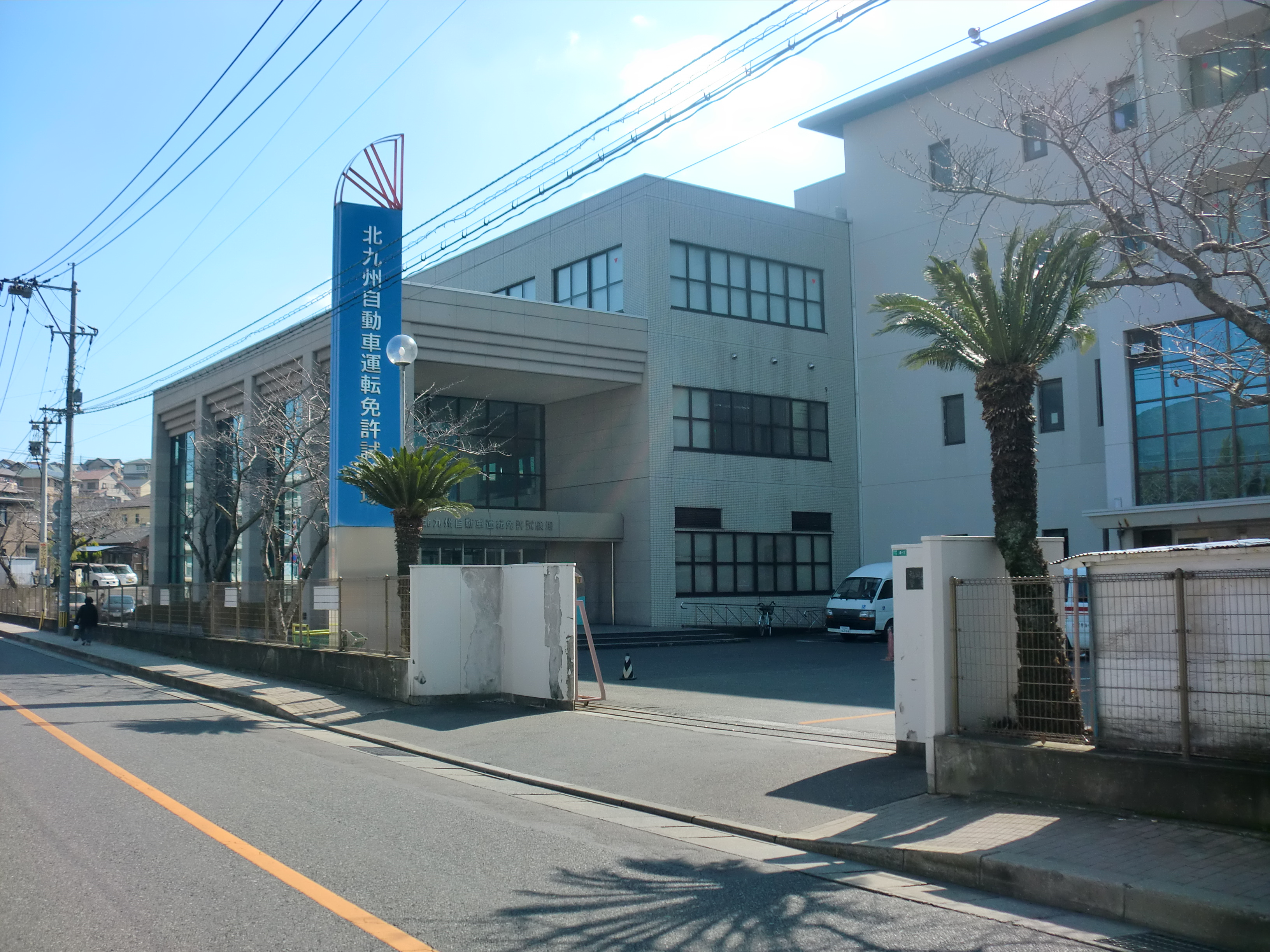 北九州市小倉南区にある北九州運転免許試験場